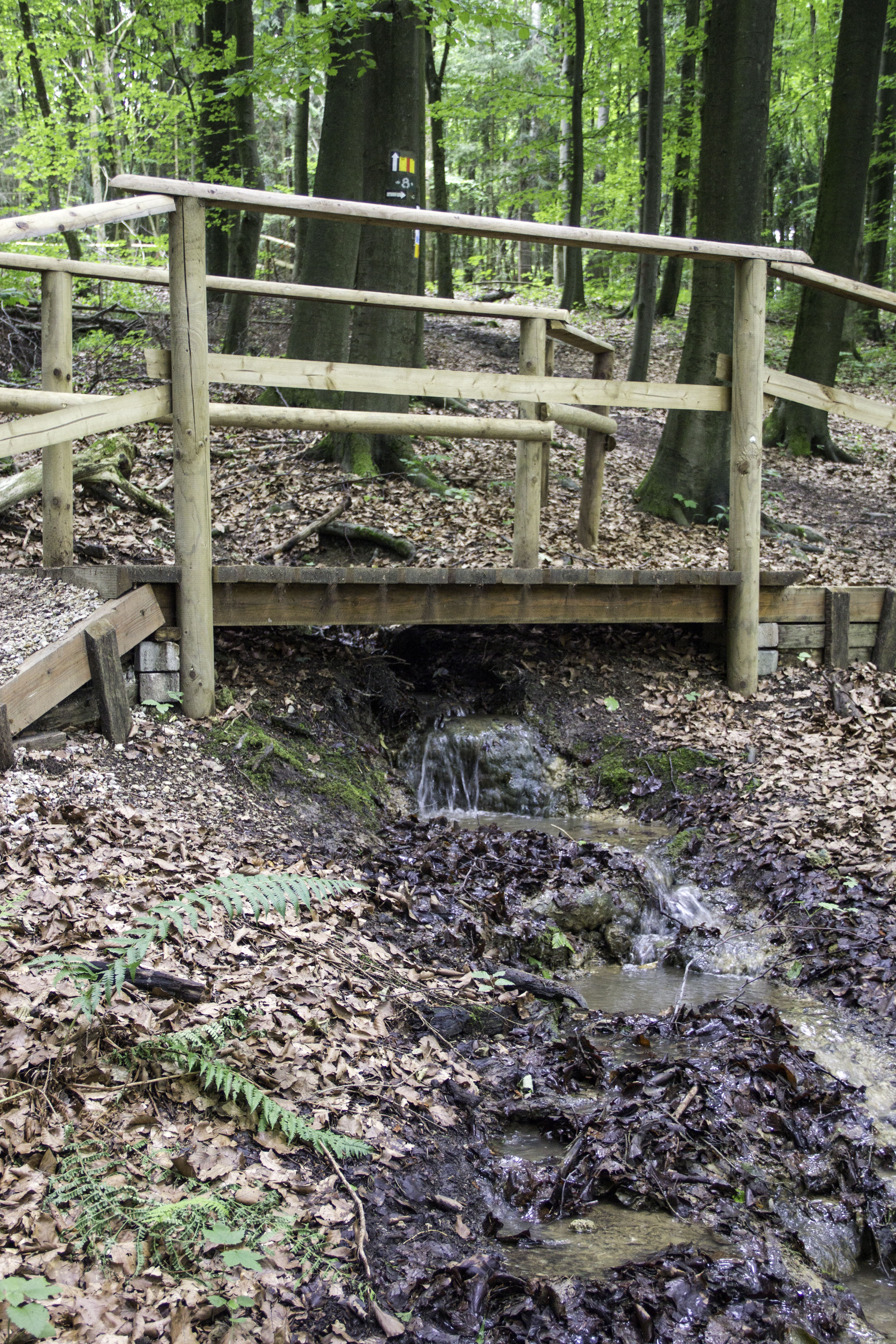 Steinerne Rinne bei Engelthal